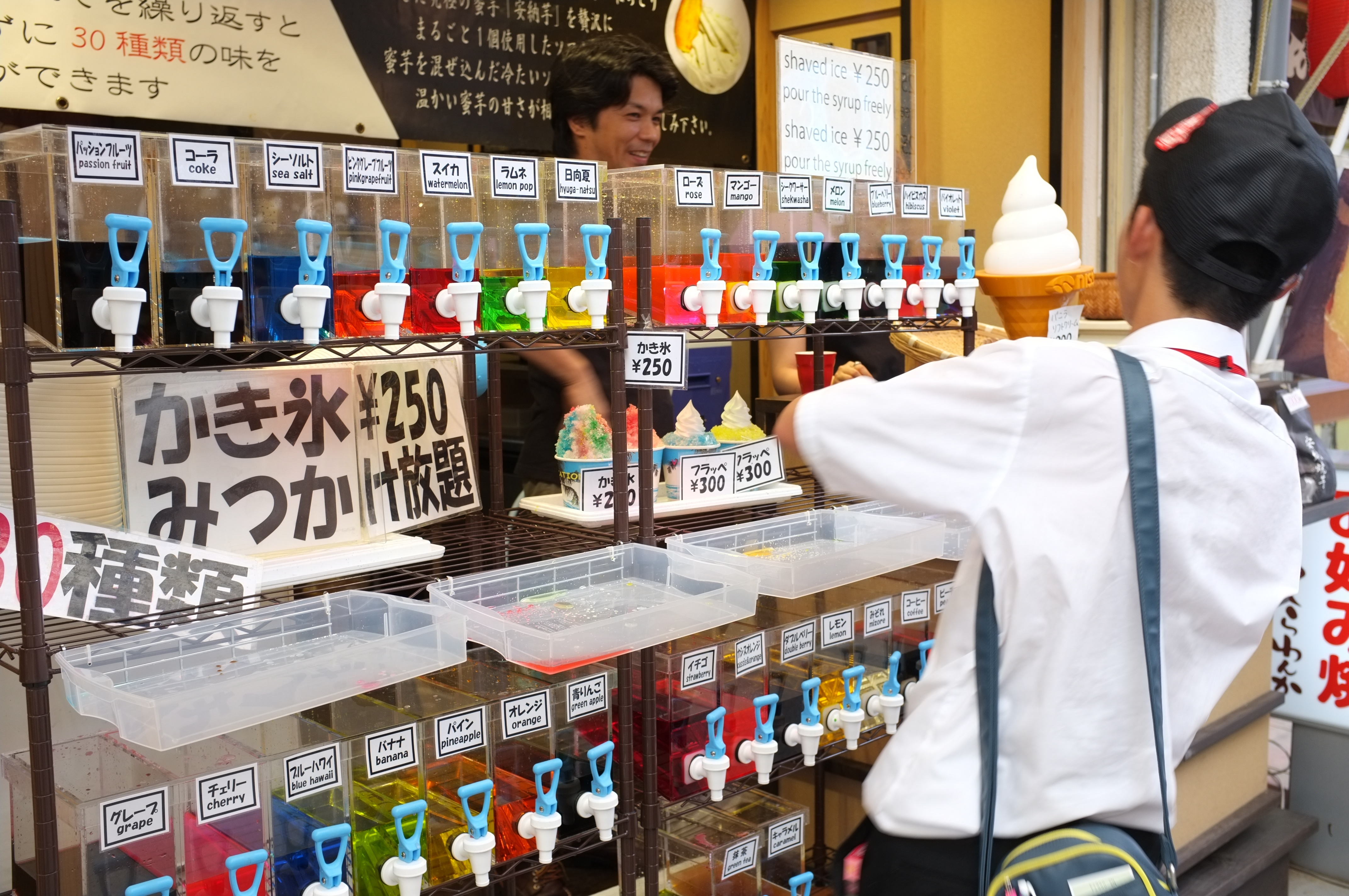 Sklep w Miyajima sprzedający kakigōri (japoński deser ze skruszonego lodu polewanego różnymi syropami)